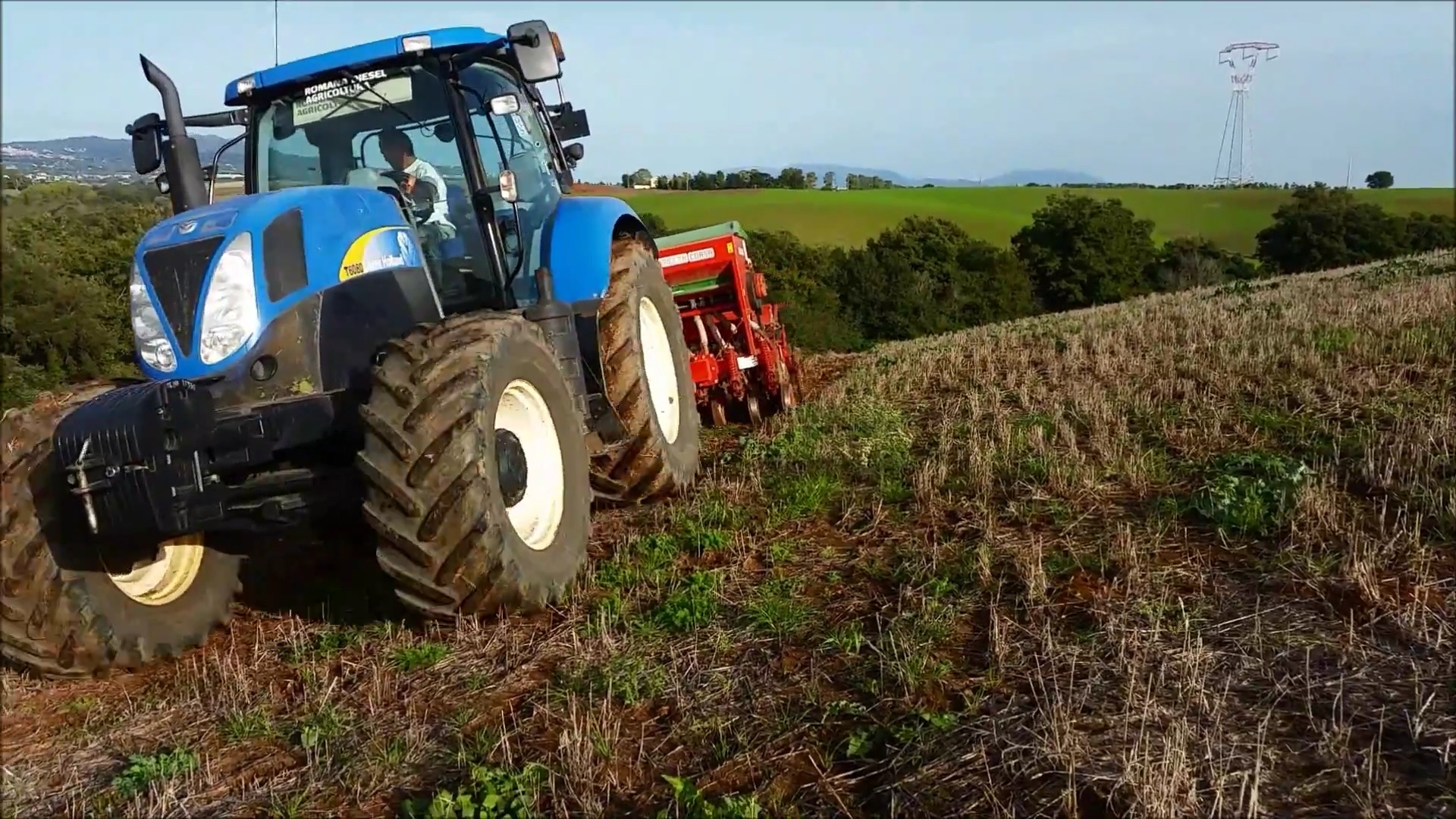 Work in the nature